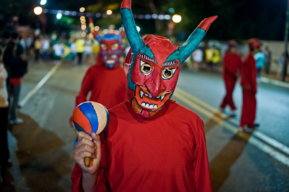 Un integrante de la comparsa boliviana conocida como “La diablada de Oruro”, avanza sobre la Avenida Mariscal López durante el Desfile de Las Naciones, de los pueblos originarios, inmigrantes, de carnavales de Paraguay y de naciones invitadas el sábado 14 de Mayo de 2011.